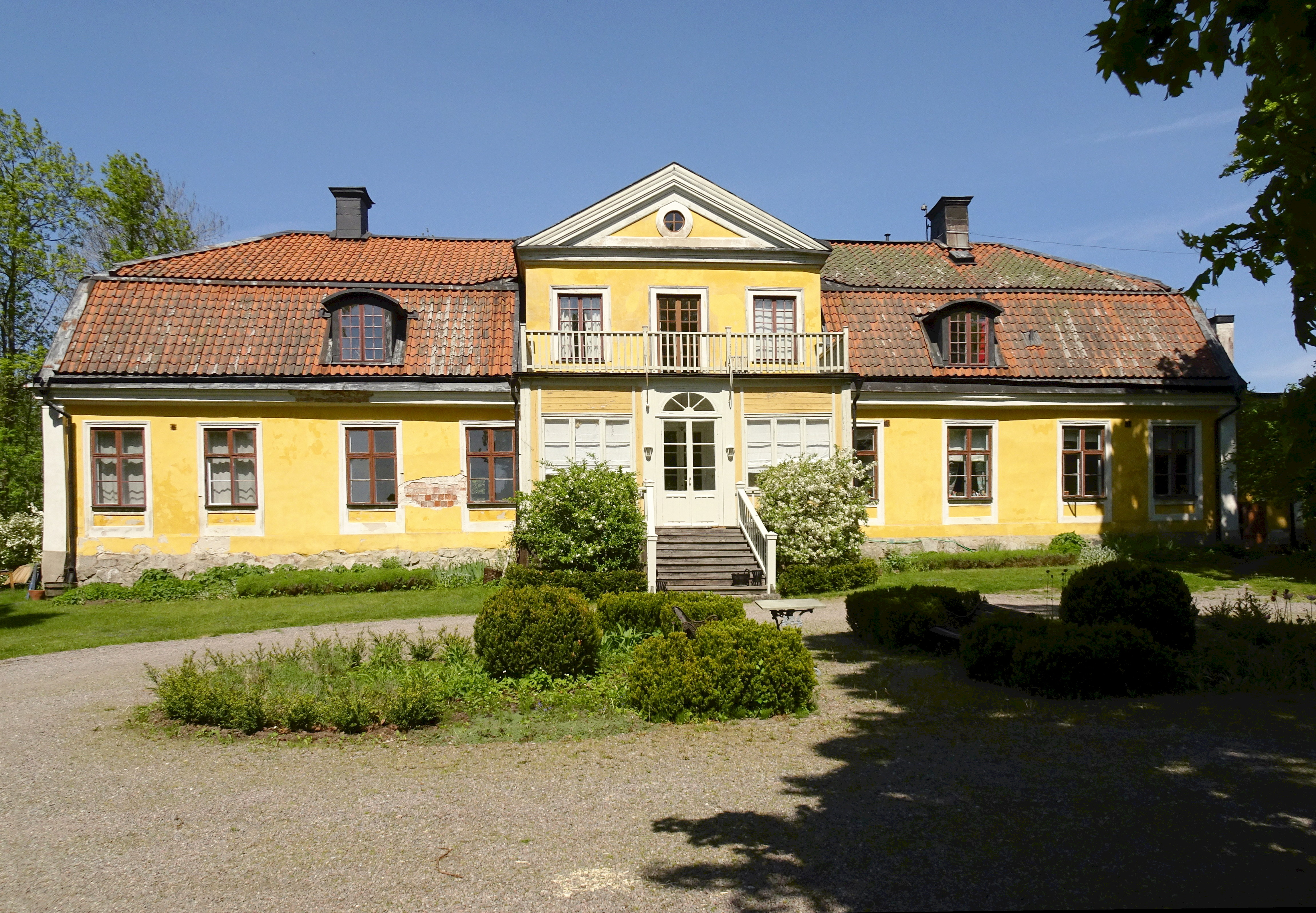 Flemingsbergs gård, huvudbyggnad